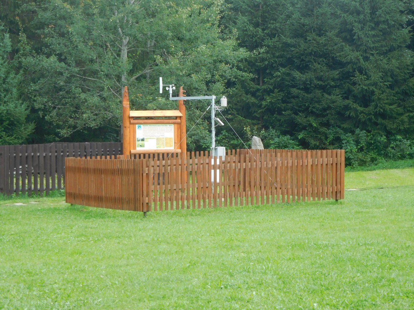 Lesnícky skanzen Vydrovo - meteo stanica